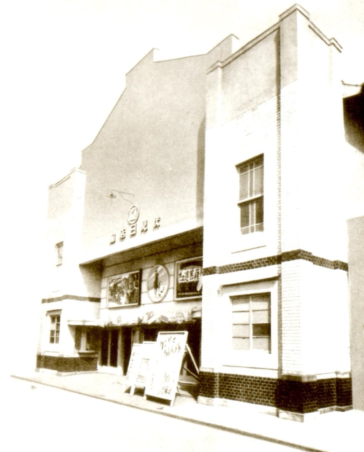 京都市の伏見日活館。